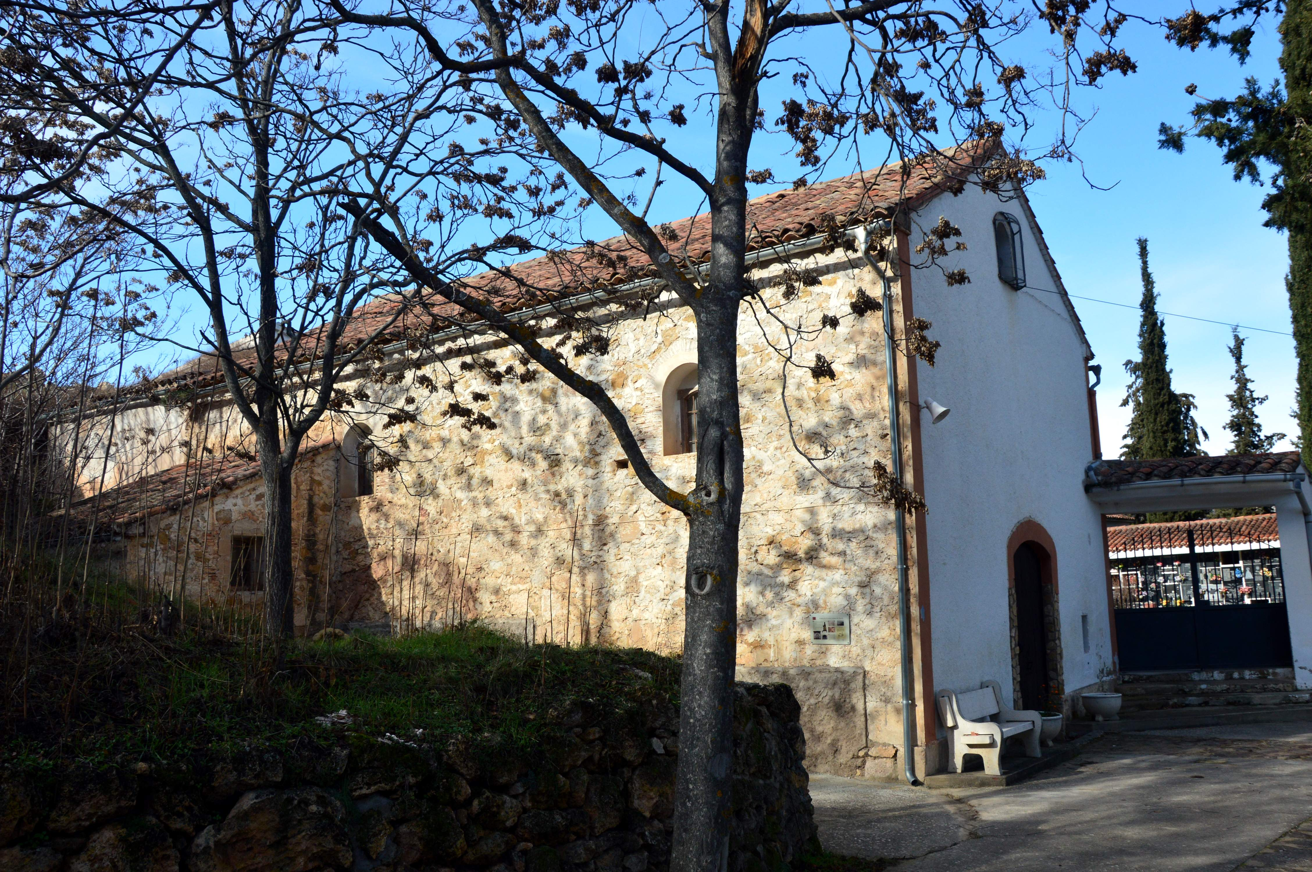 Vista parcial (suroriental) de la Ermita de la Virgen de Gracia (Castielfabib, Valencia), 2018.